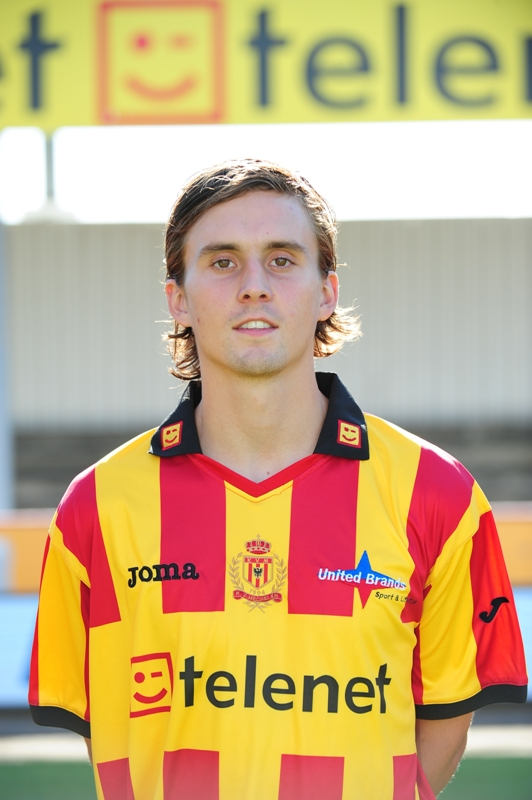 Bjarni Viðarsson